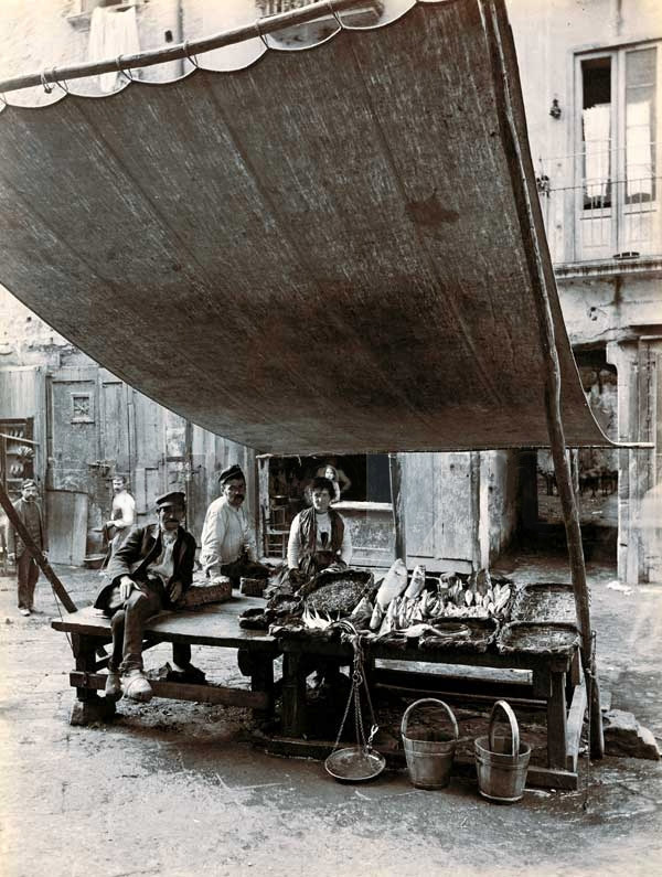 La bancarella di un pescivendolo nel 1890 a Napoli - Italia.